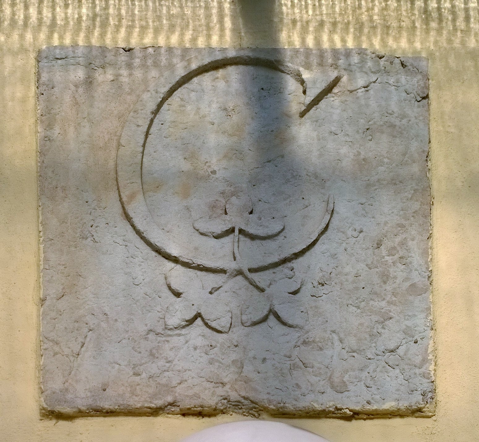 Schloss Röhrsdorf: Wappen hinter der Hofeinfahrt auf nördlichem Nebengebäude